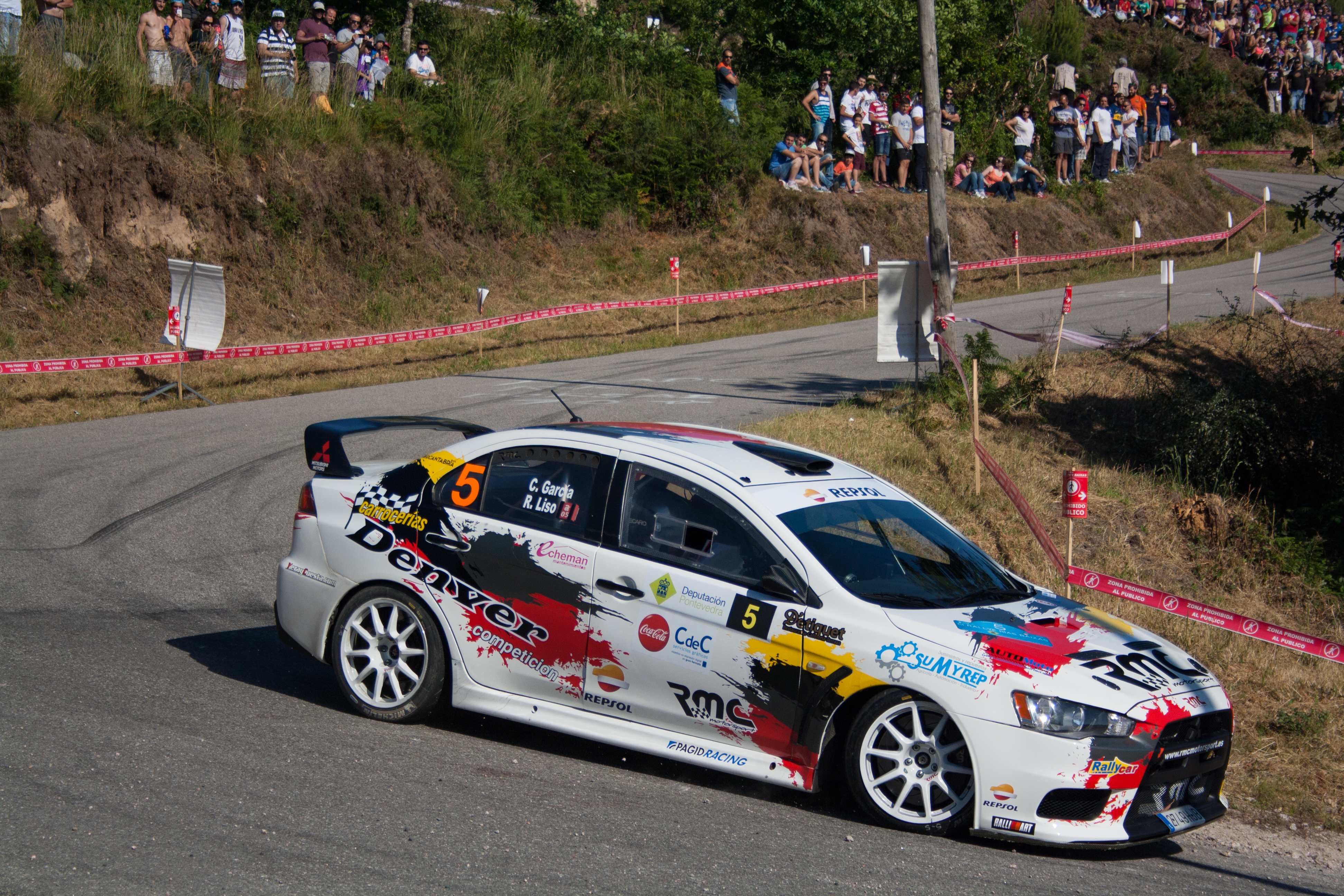 TC 2-4 (Nigrán)